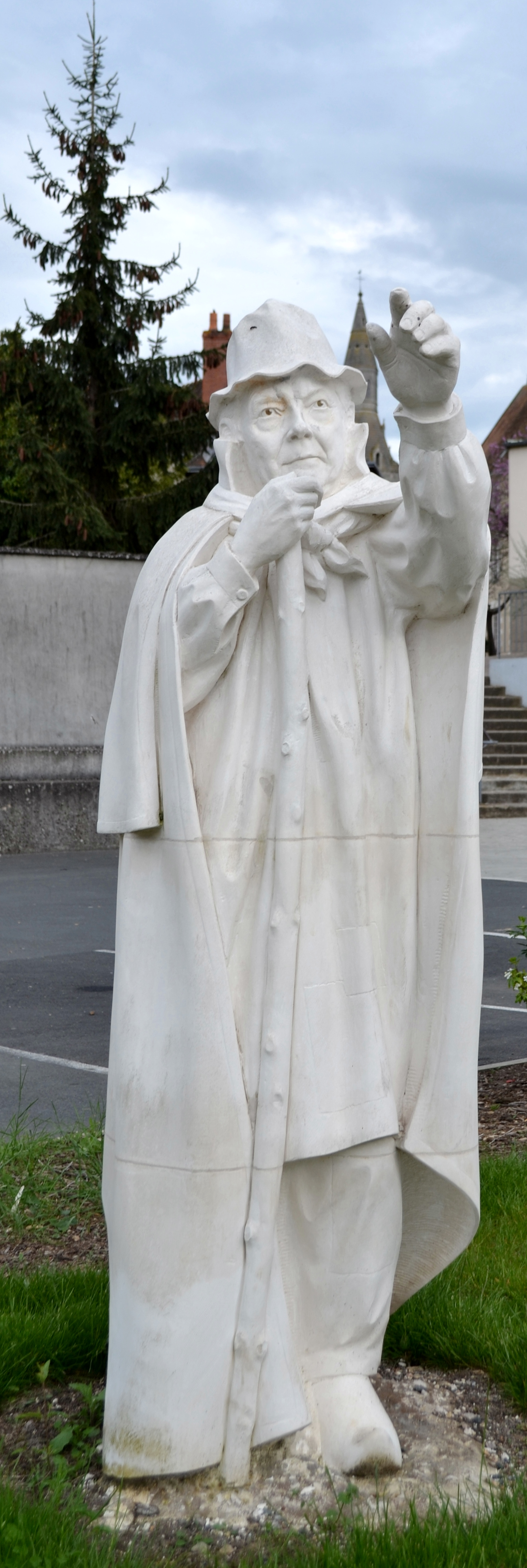 Statue de Jean-Louis Boncoeur, homme de lettres, La Châtre, Indre